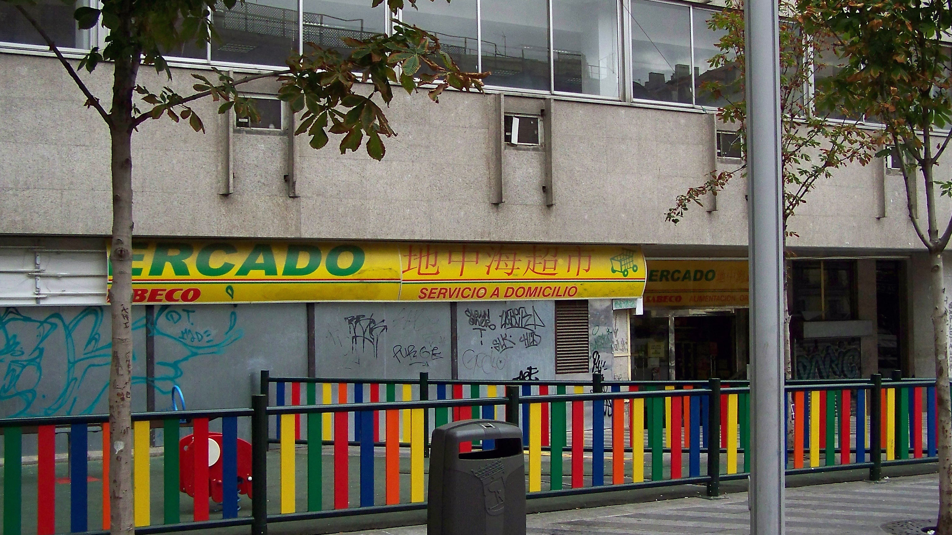 Fachada de una franquicia del grupo Sabeco